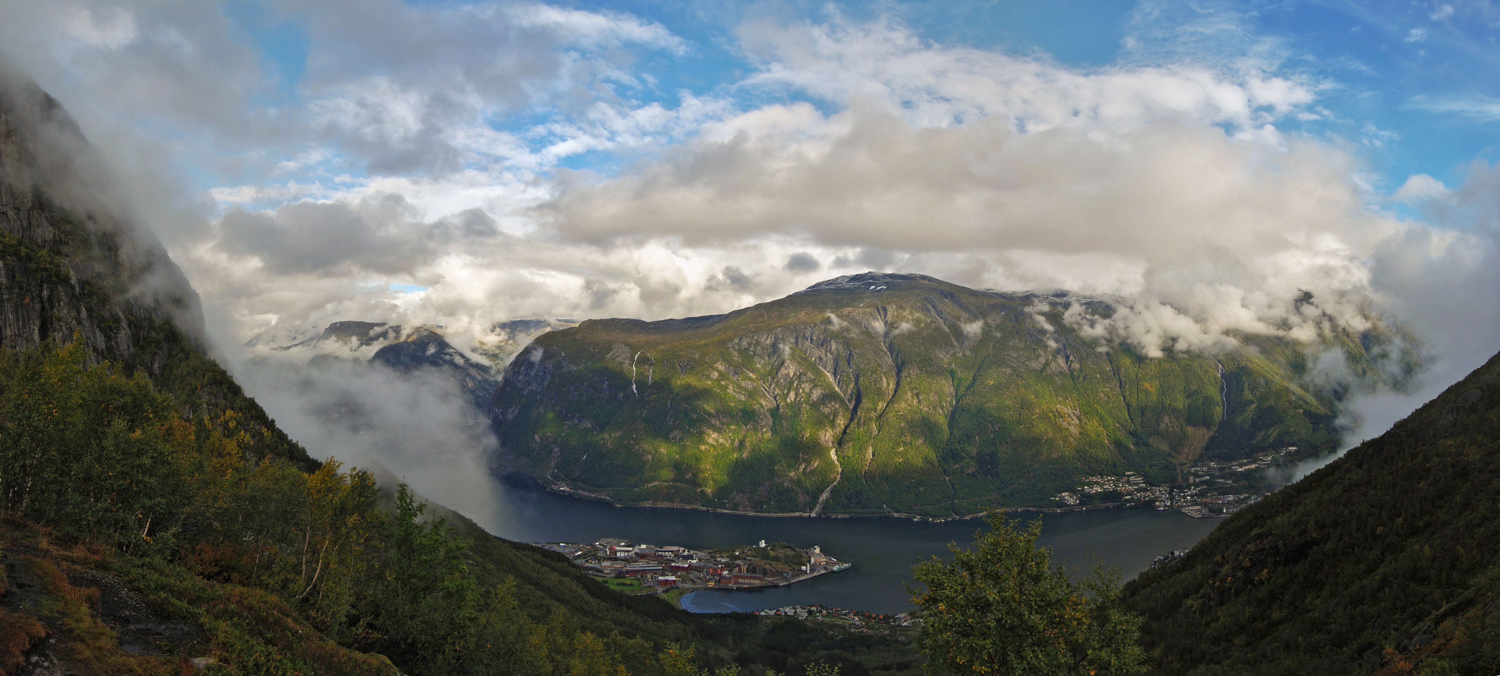 Nebenarm des Hardangerfjordes, Norwegen